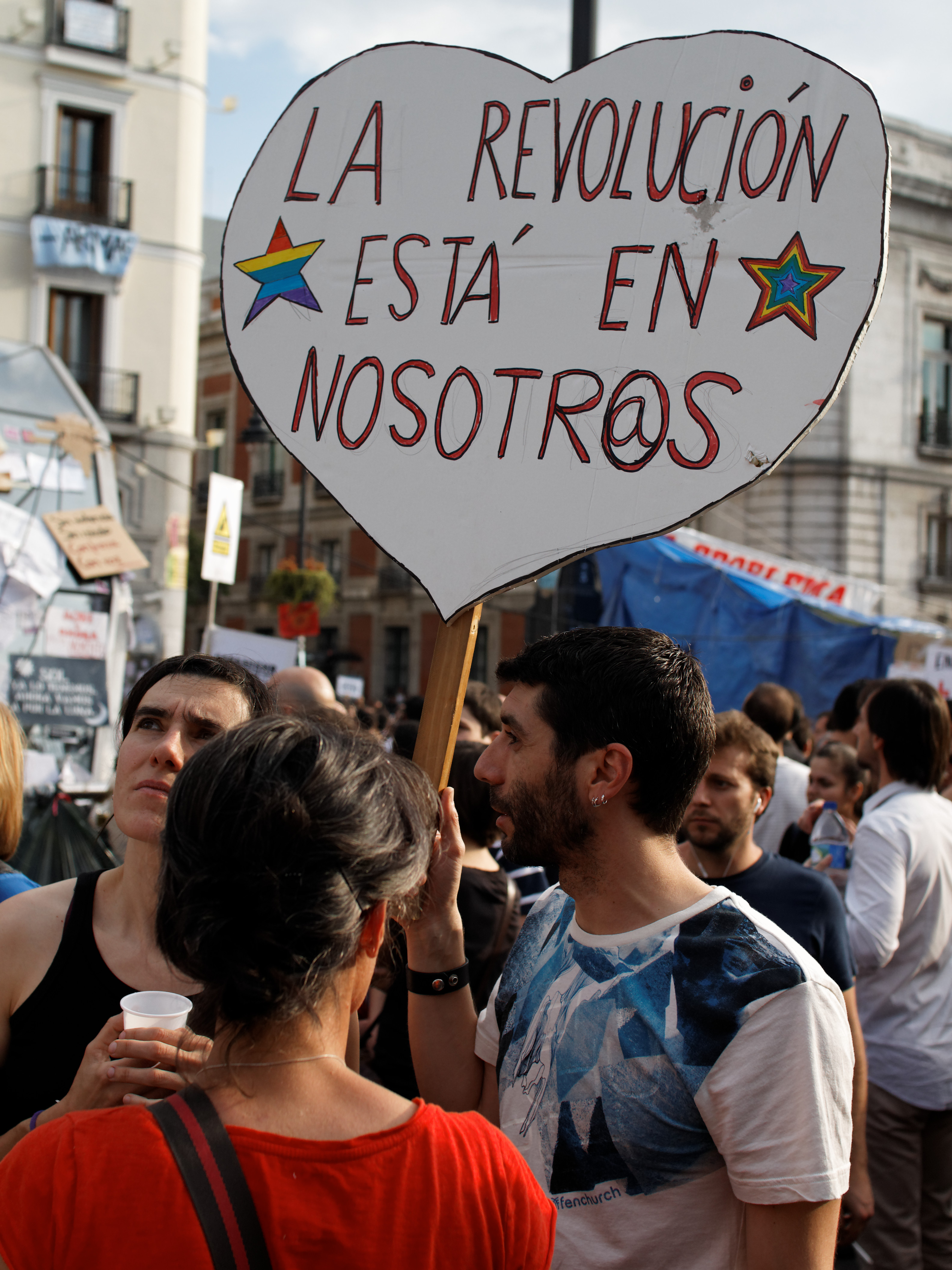 Manifestante con pancarta en una de las manifestaciones de Acampada Sol. Puerta del Sol, Madrid.